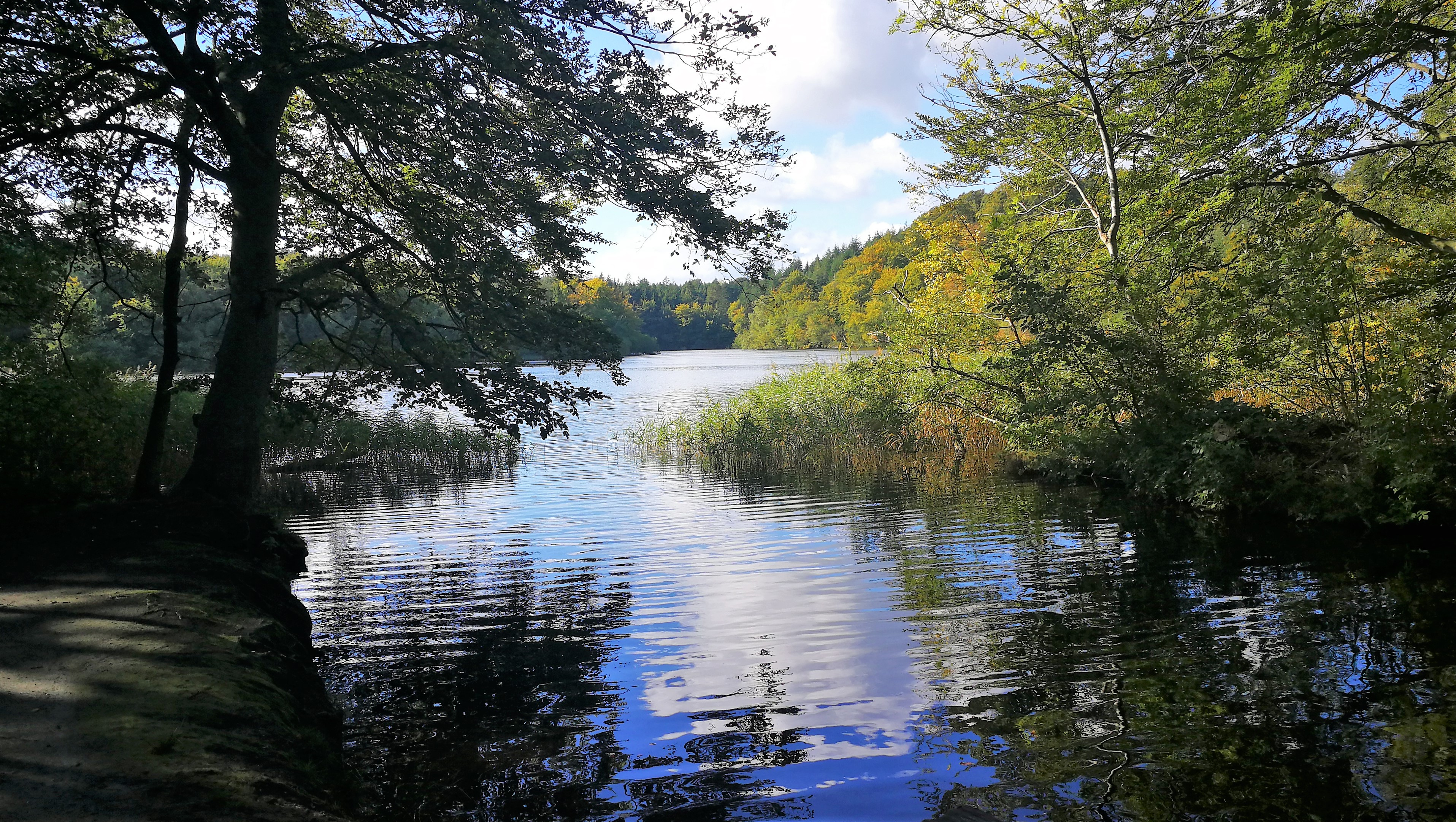 Avnsø set fra Klyvers Kanal